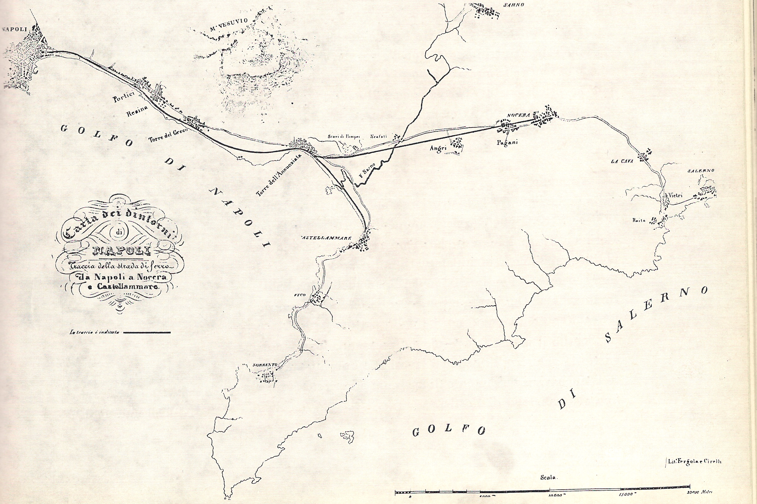 Planimetria della linea Napoli-Castellammare-Nocera. Licensing Data: fra il 1844 (completamento della linea fino a Nocera) e il 1858 (prolungamento della linea a Cava de' Tirreni).